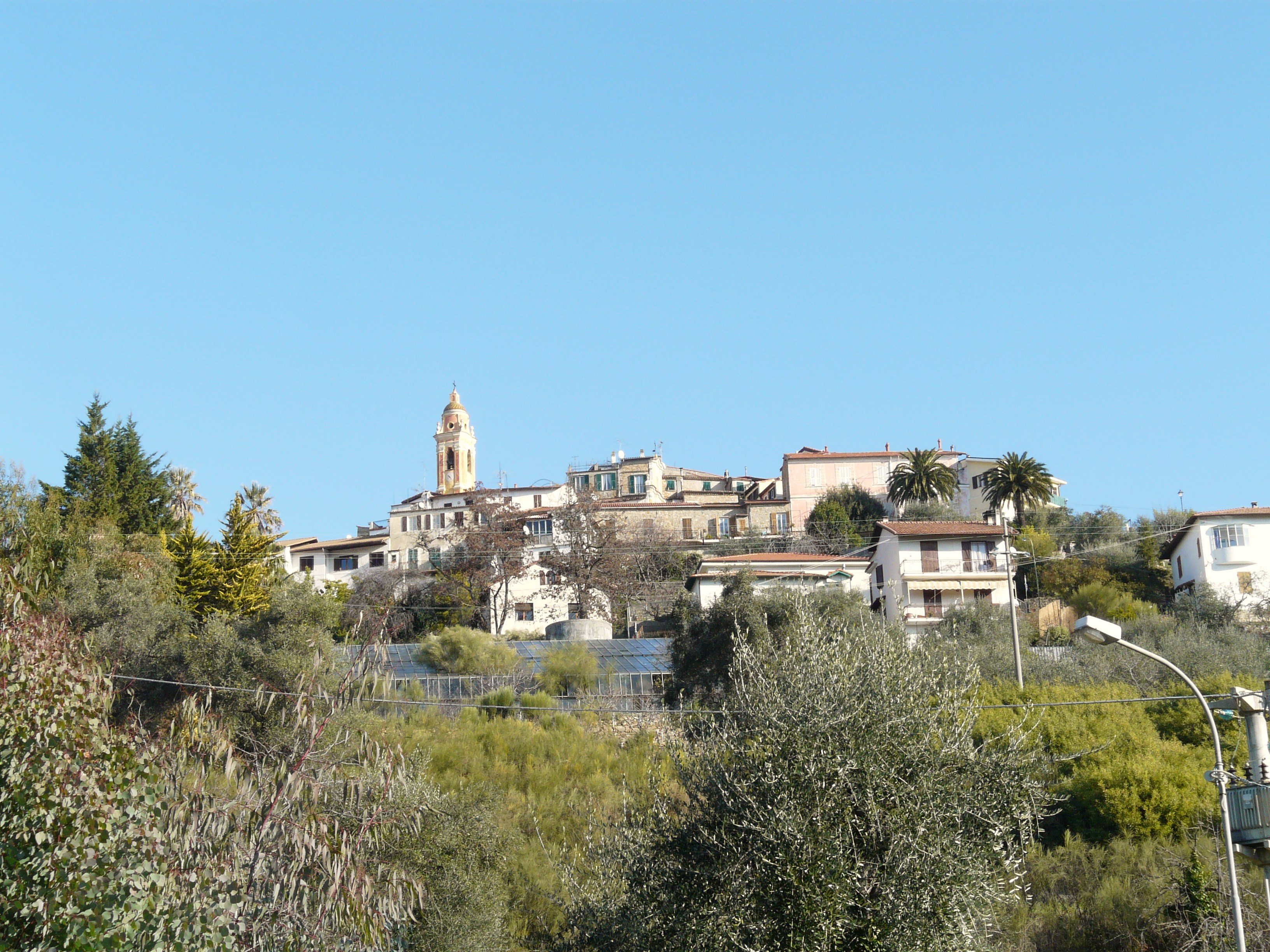 Seborga, Liguria, Italia